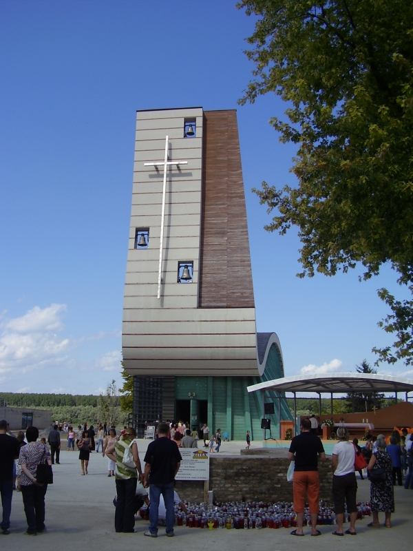 Novoizgrađena aljmaška crkva Pohođenja Marijina